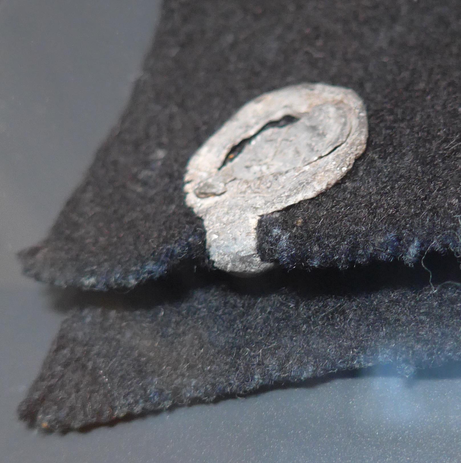 Warenplombe aus Blei an einem schwarzen Laken des Bremer Fischeramts von 1666. Bremen, Focke-Museum Inv.Nr. C.0208h (Detail)